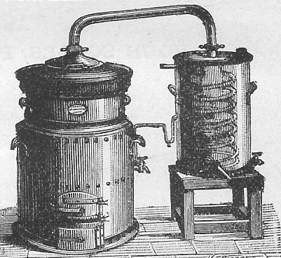 alambic fin 19 è siècle